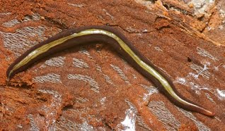 Plathelminthe terrestre invasif, probablement Geoplanidae. Photo prise à Cagnes-sur-Mer, Alpes Maritimes. Photographe: Pierre Gros